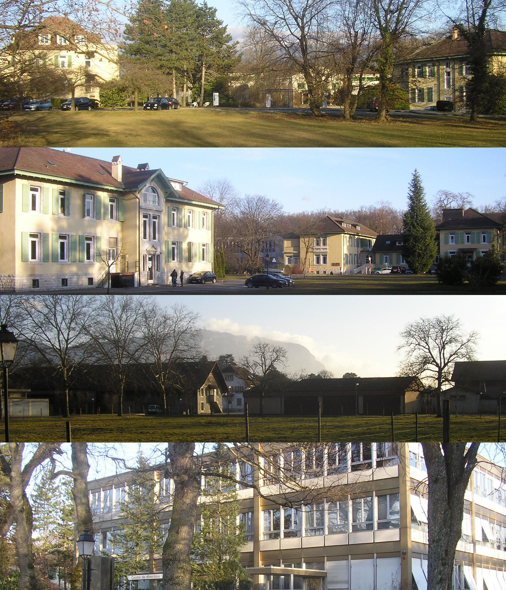 Cinq panoramas du parc et des bâtiments de la Clinique de Belle-Idée à Genève.